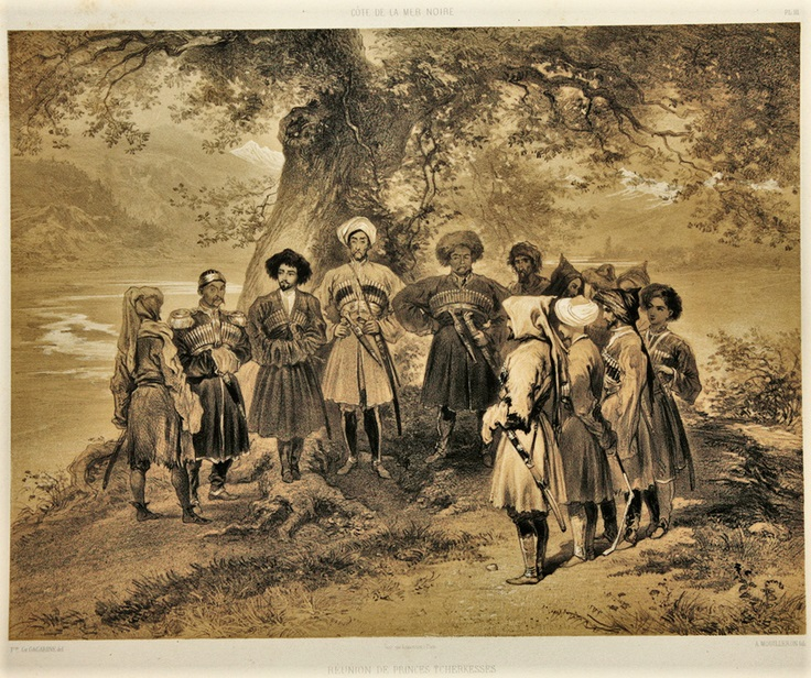 Cotes de la Mer Noire. Reunion de princes tcherkesses.